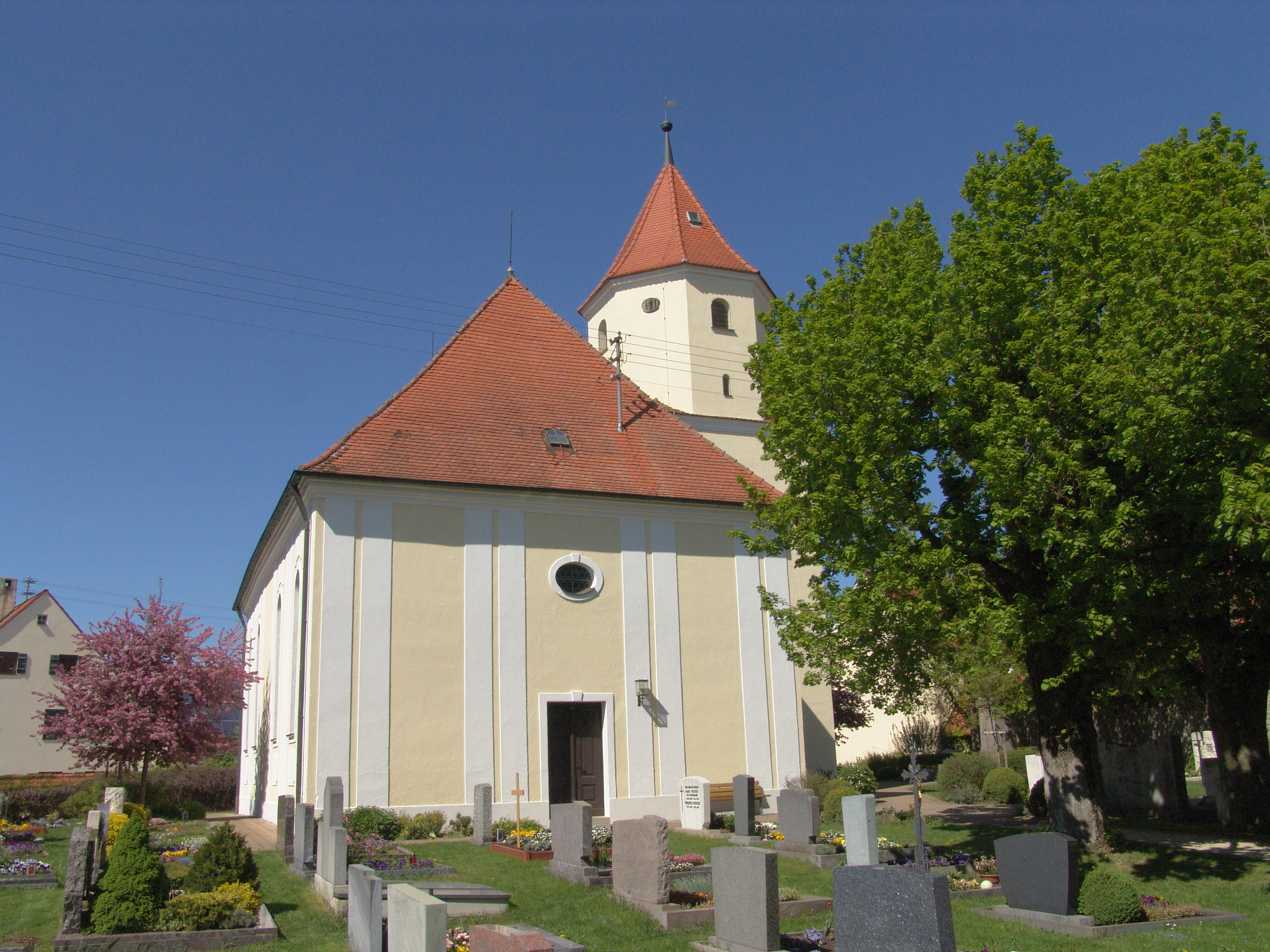 evang.-luth. Kirche St. Gallus in Baldingen